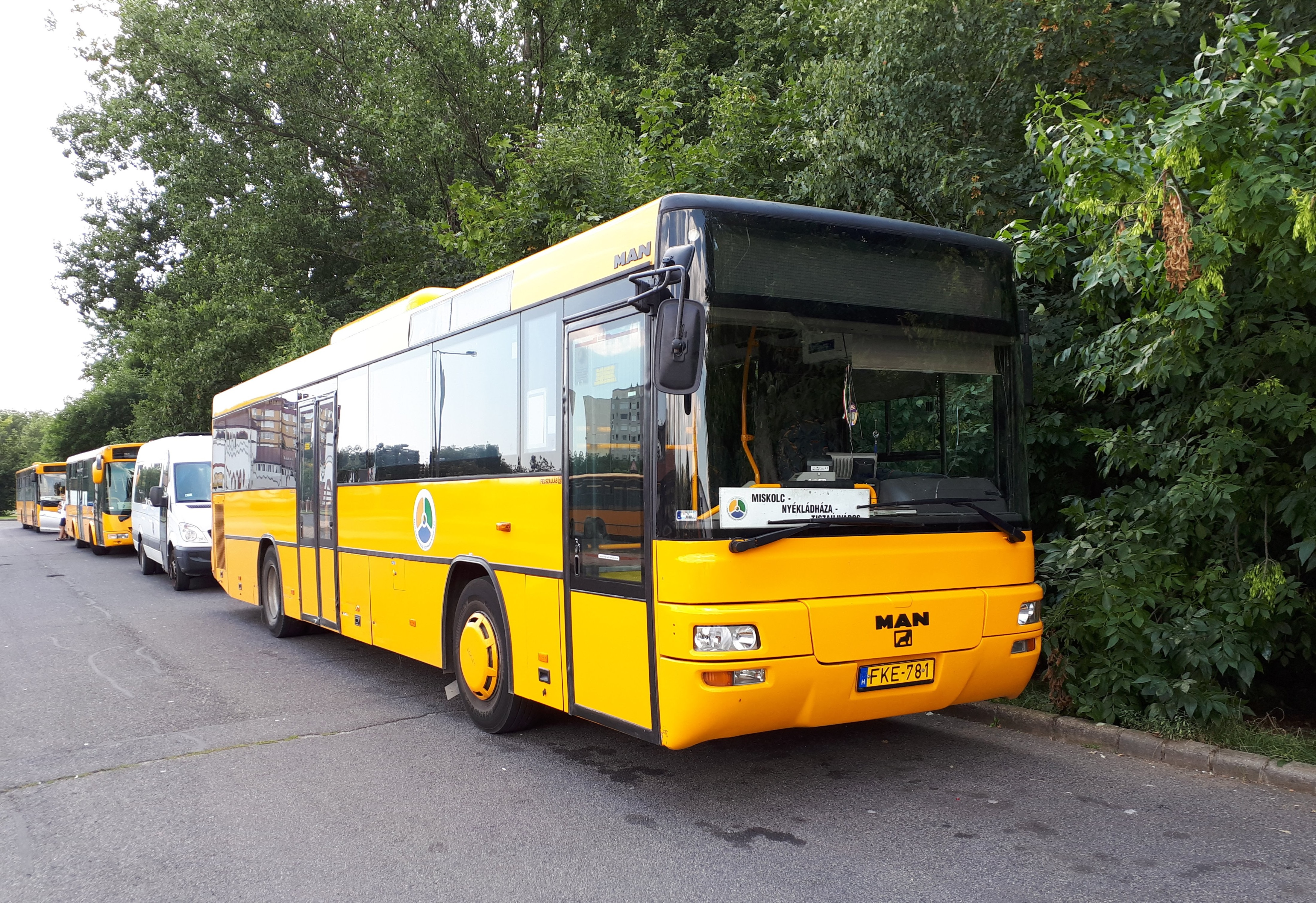 Az ÉMKK FKE-781 rendszámú MAN SÜ 363 típusú busza Tiszaújvárosban, a 3745-ös helyközi járaton.